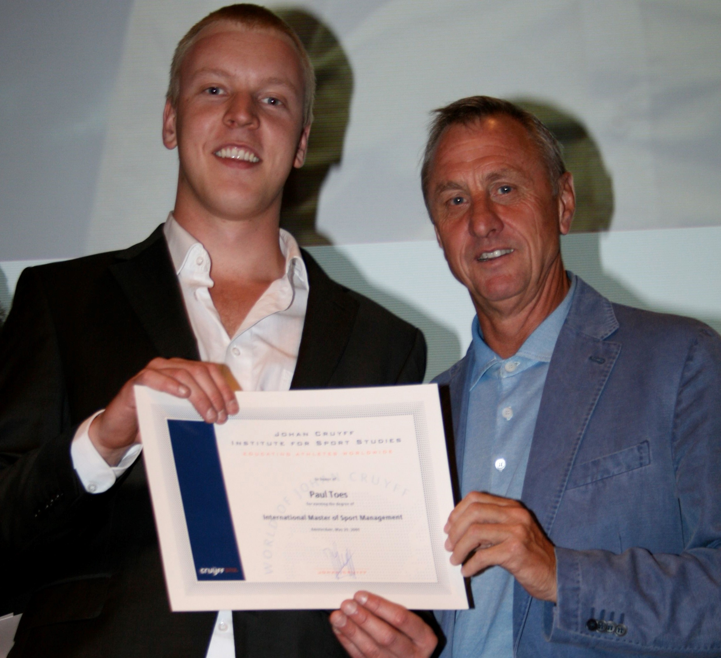 Certificaat Johan Cruijff Academie